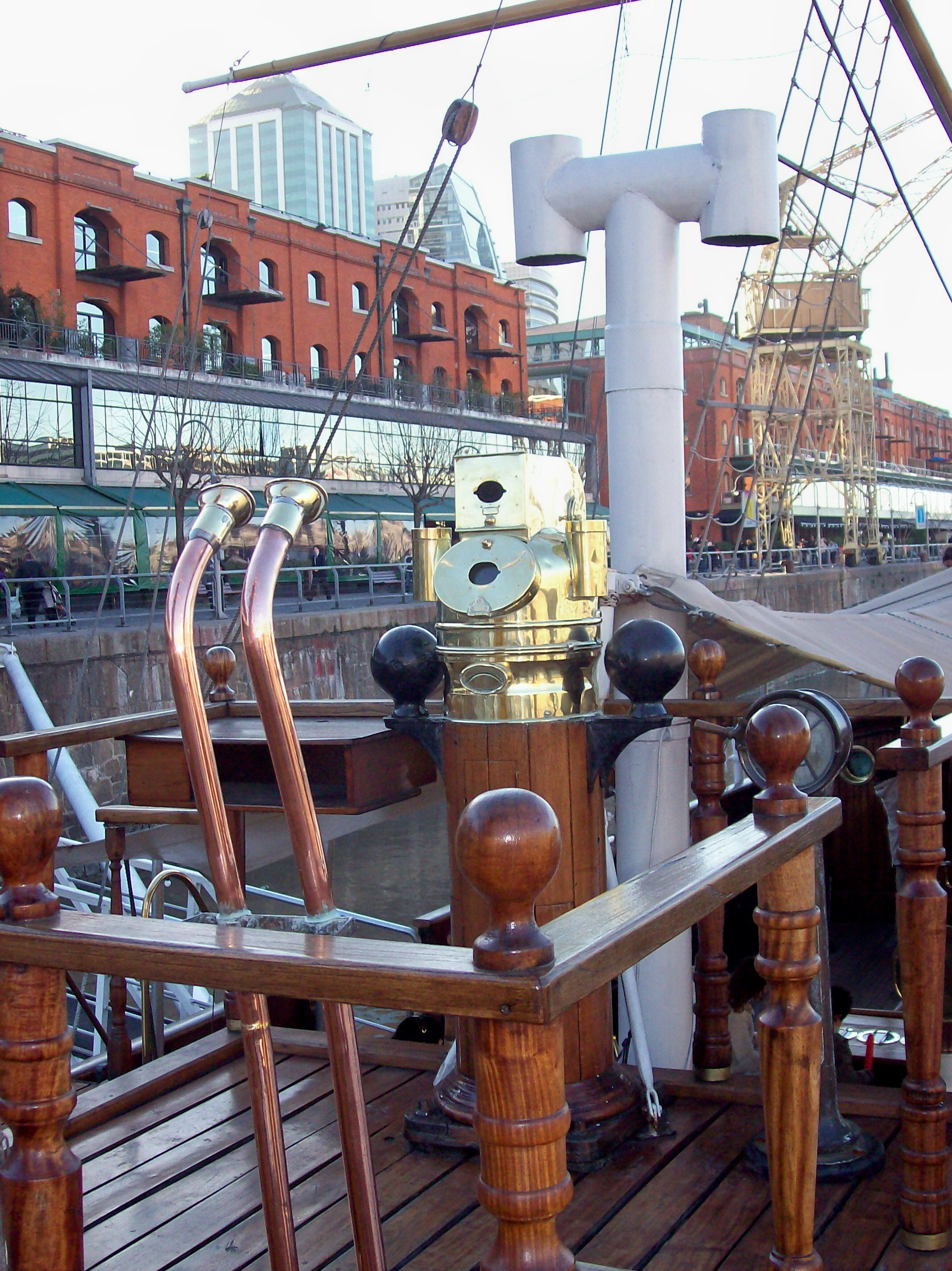 Buque Museo Corbeta A.R.A. Uruguay en puerto Madero, Buenos Aires. Foto de la brújula.